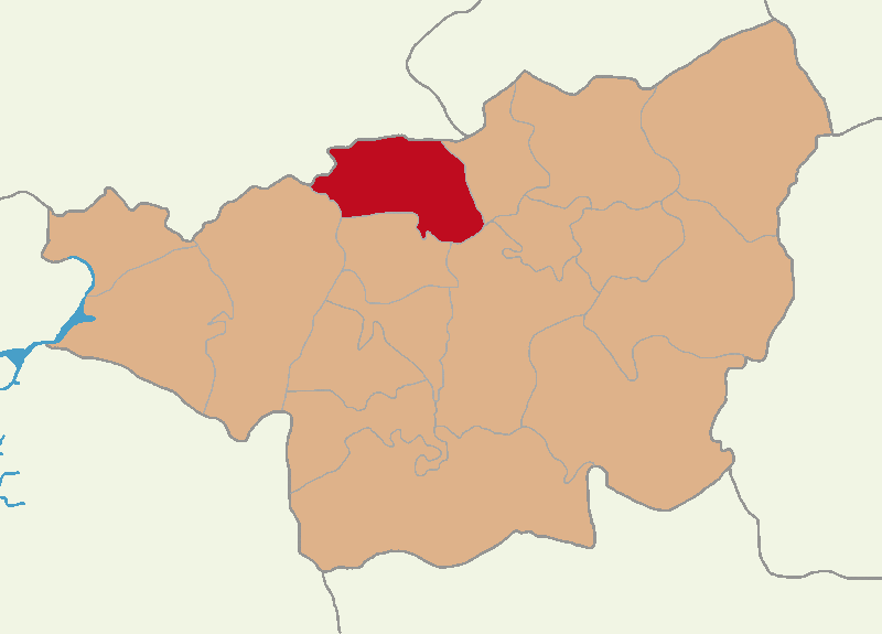 Dicle ilçesinin konumu